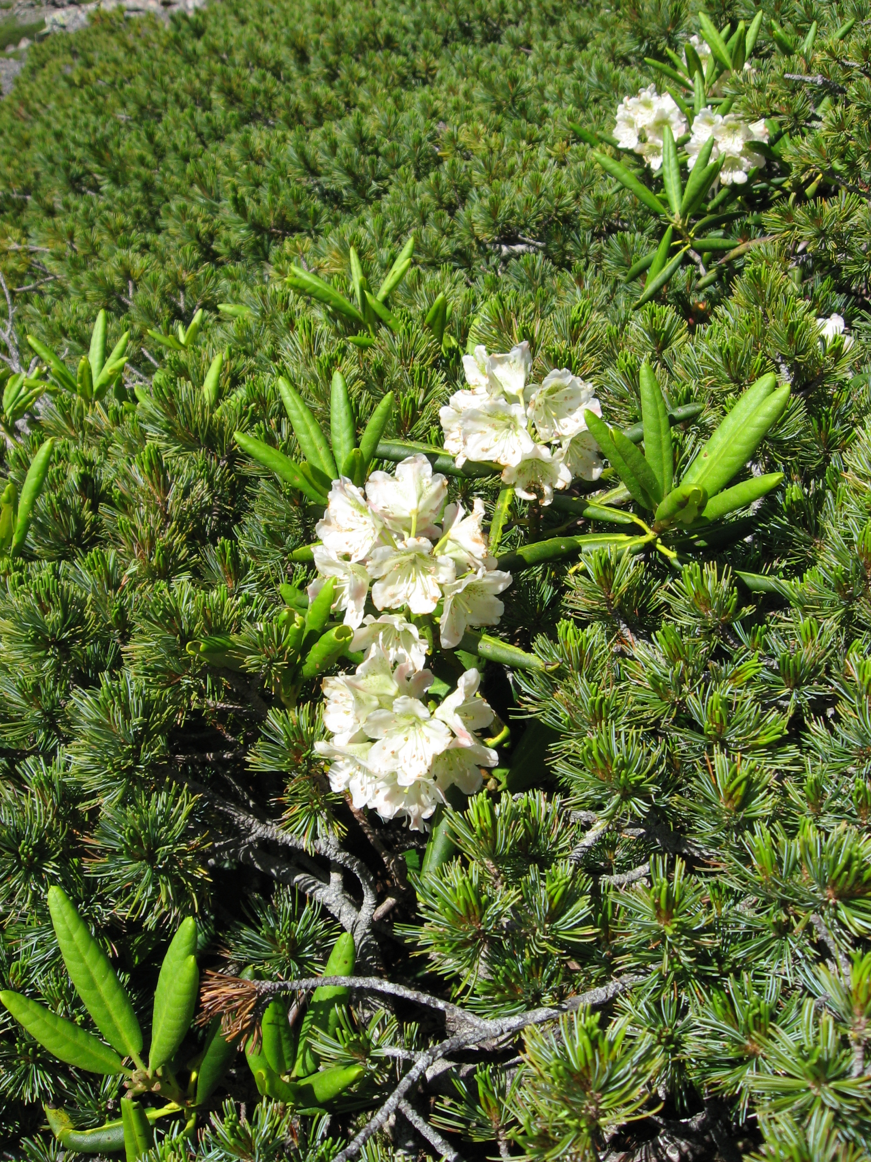 キバナシャクナゲ (Rhododendron aureum)